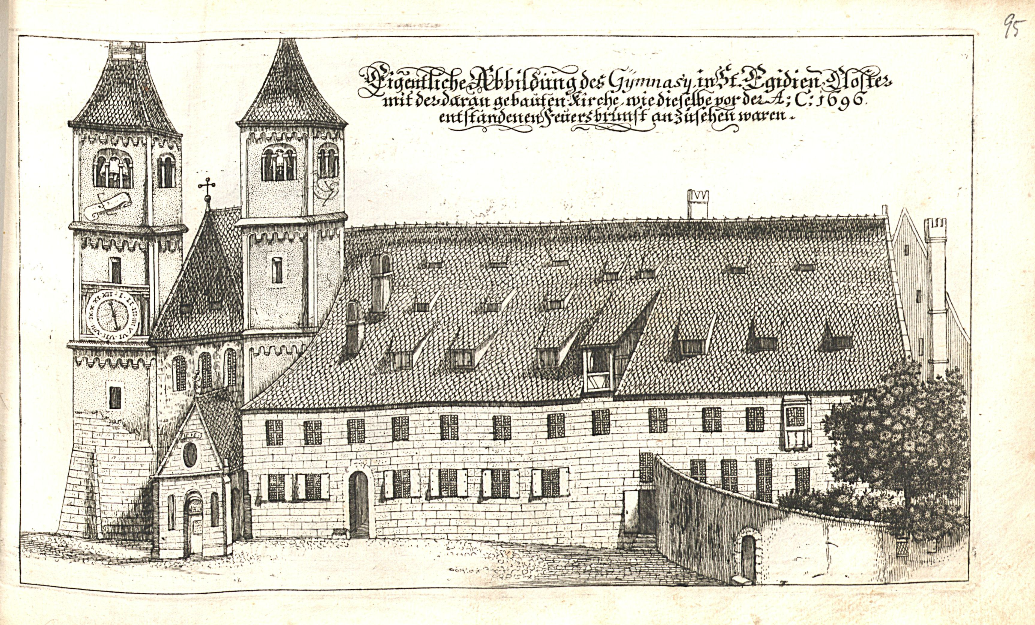 Stich aus "Des Heil. Röm. Reichs Stadt Nürnberg Zierdte" von Johann Alexander Böner. Exemplar mit der Signatur: Eichstätt-Ingolstadt, Universitätsbibliothek -- 04/1 WG 300